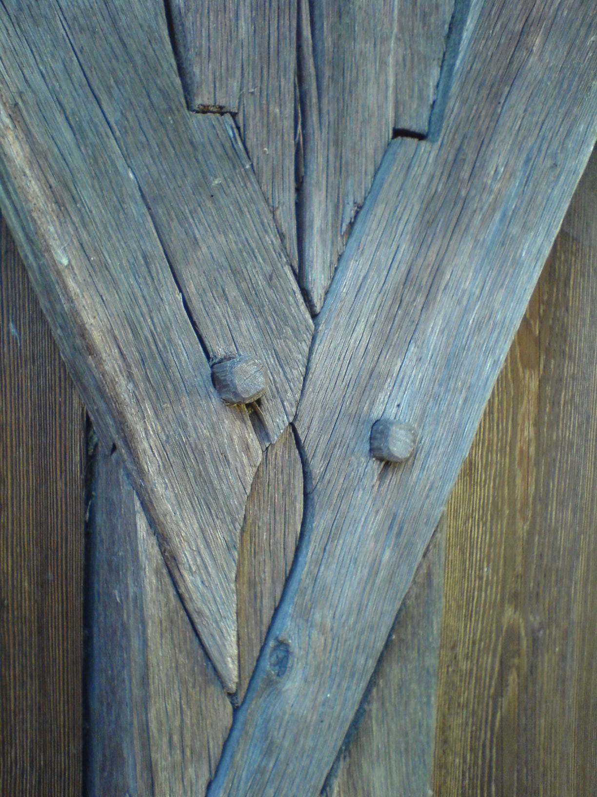 drevené spoje